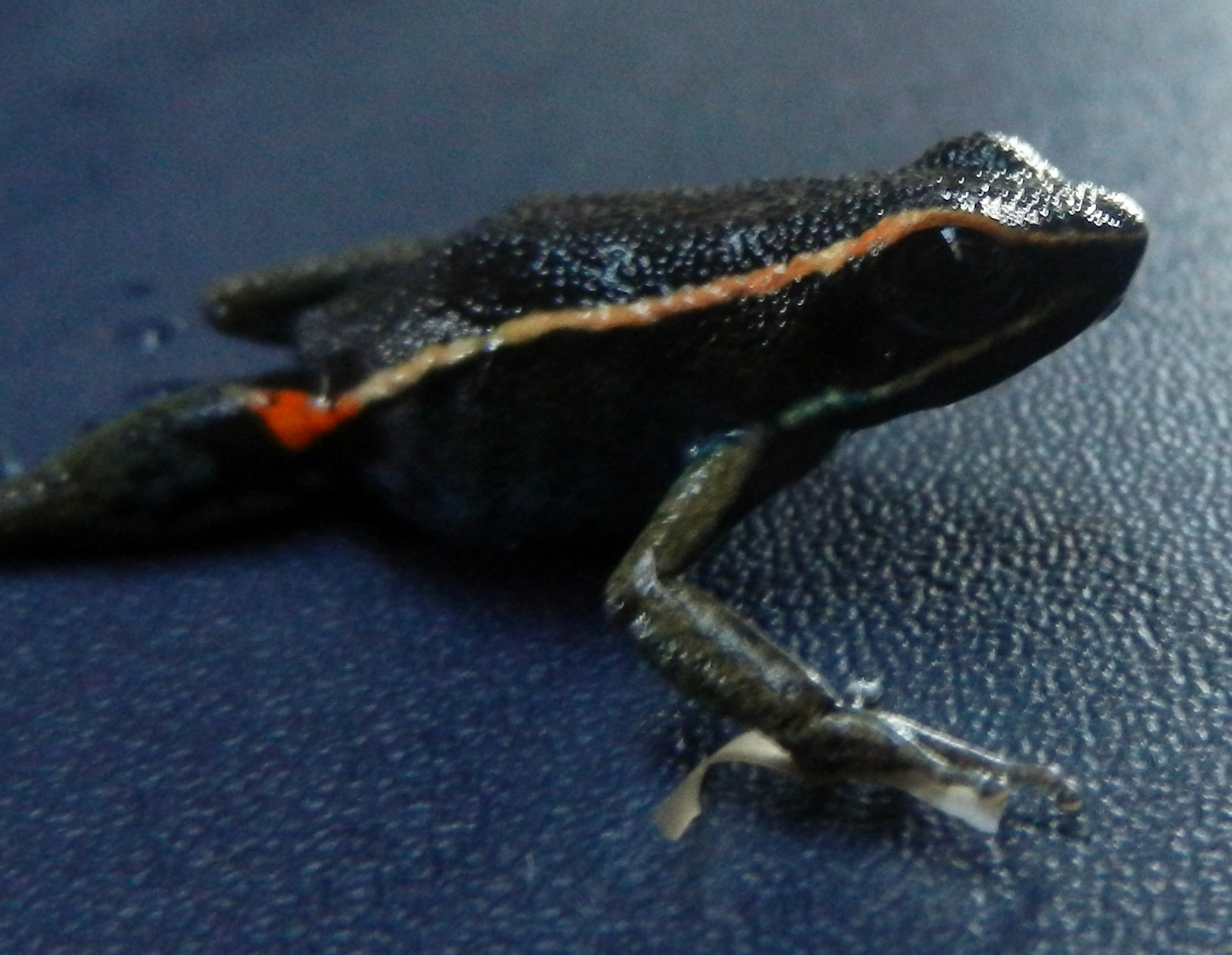 Ameerega shihuemoy, Madre de Dios, Perú